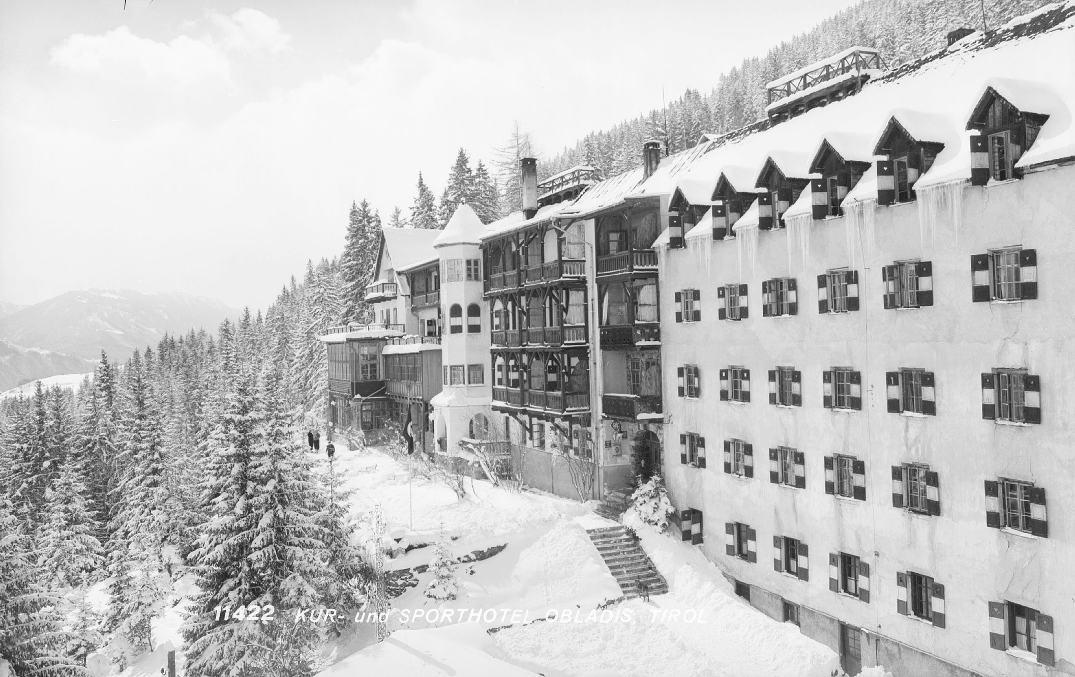 Kur und Sporthotel Obladis / Tirol